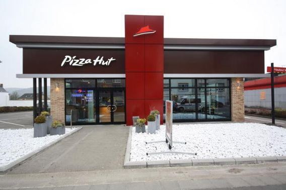 Pizza Hut de Beggen, élu plus beau restaurant Piza Hut d'Europe après sa rénovation en 2008.